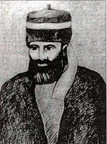 Kunta-haji, 1860ies drawung